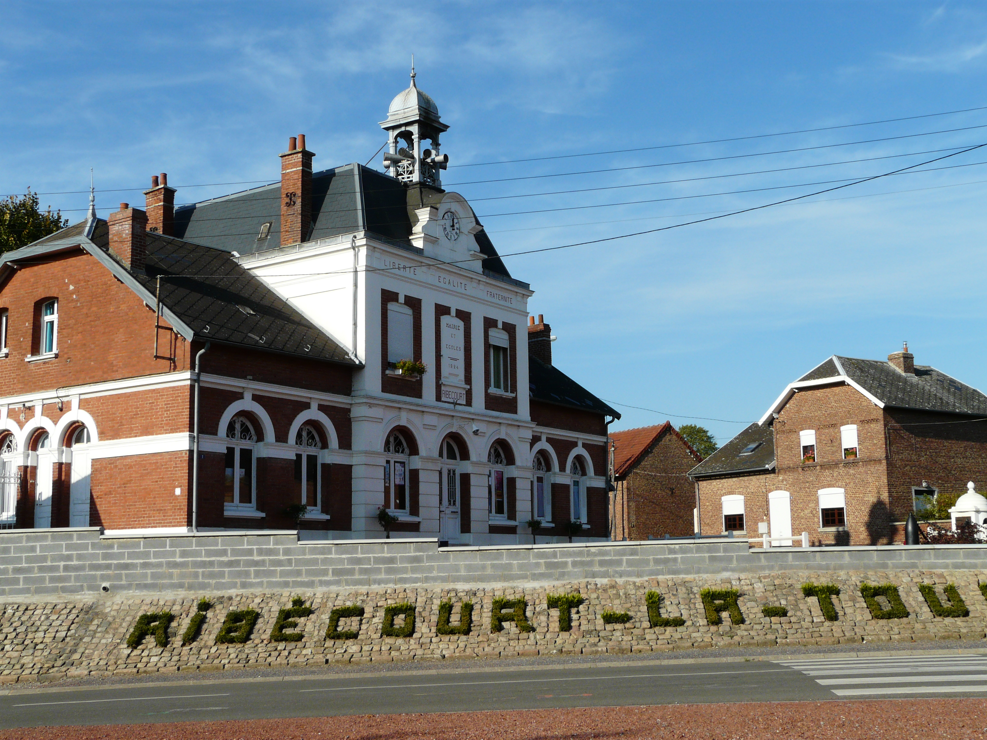 Mairie de Ribécourt-la-Tour (Nord, France) reconstruite après la 1ere Guerre mondiale